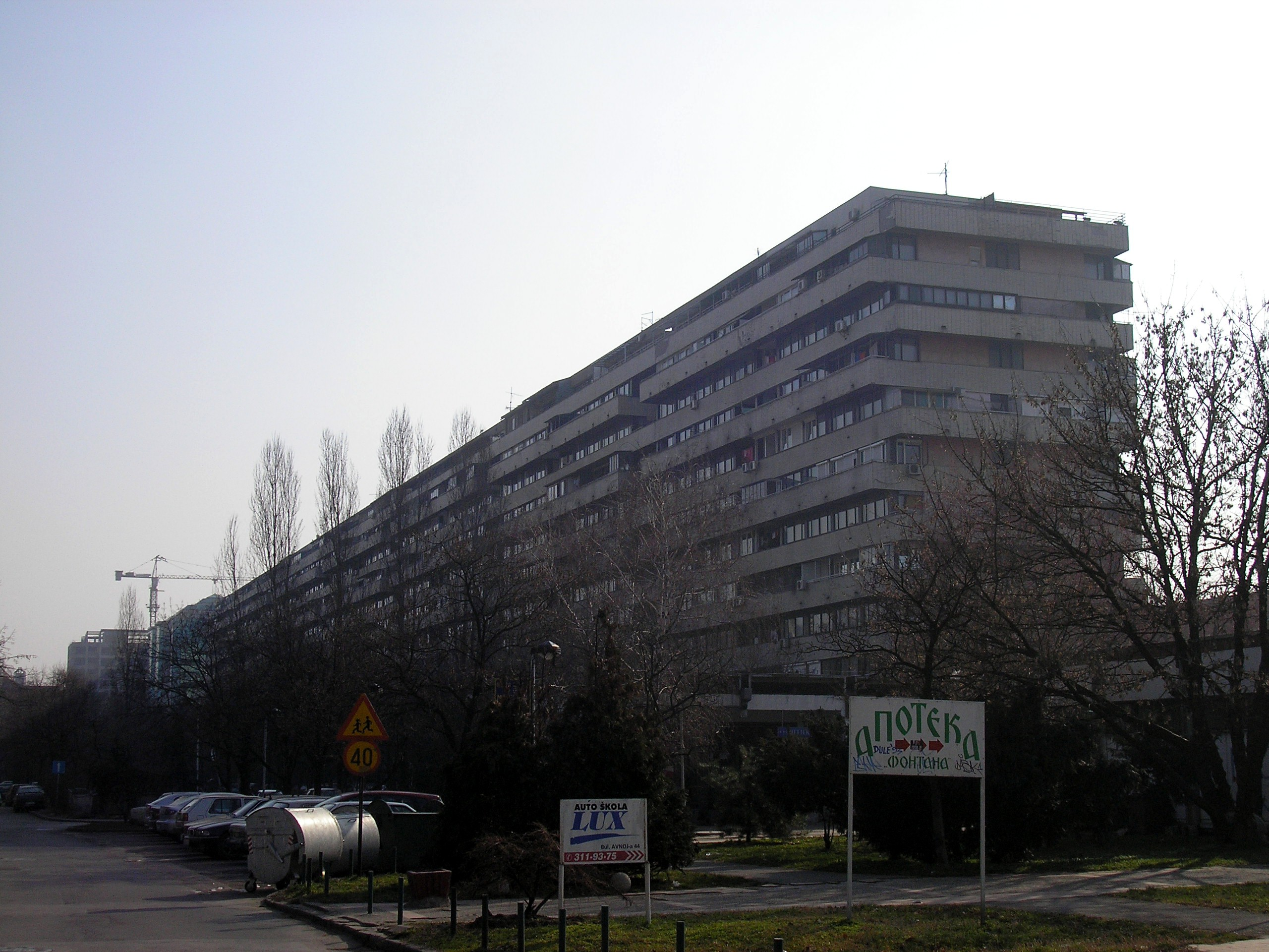 A detail from 21st block, New Belgrade, Belgrade, Serbia